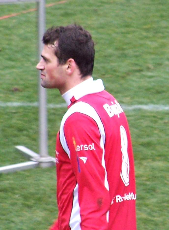 Albert Bunjaku (Rot-Weiß Erfurt) nach dem Spiel gegen Dynamo Dresden